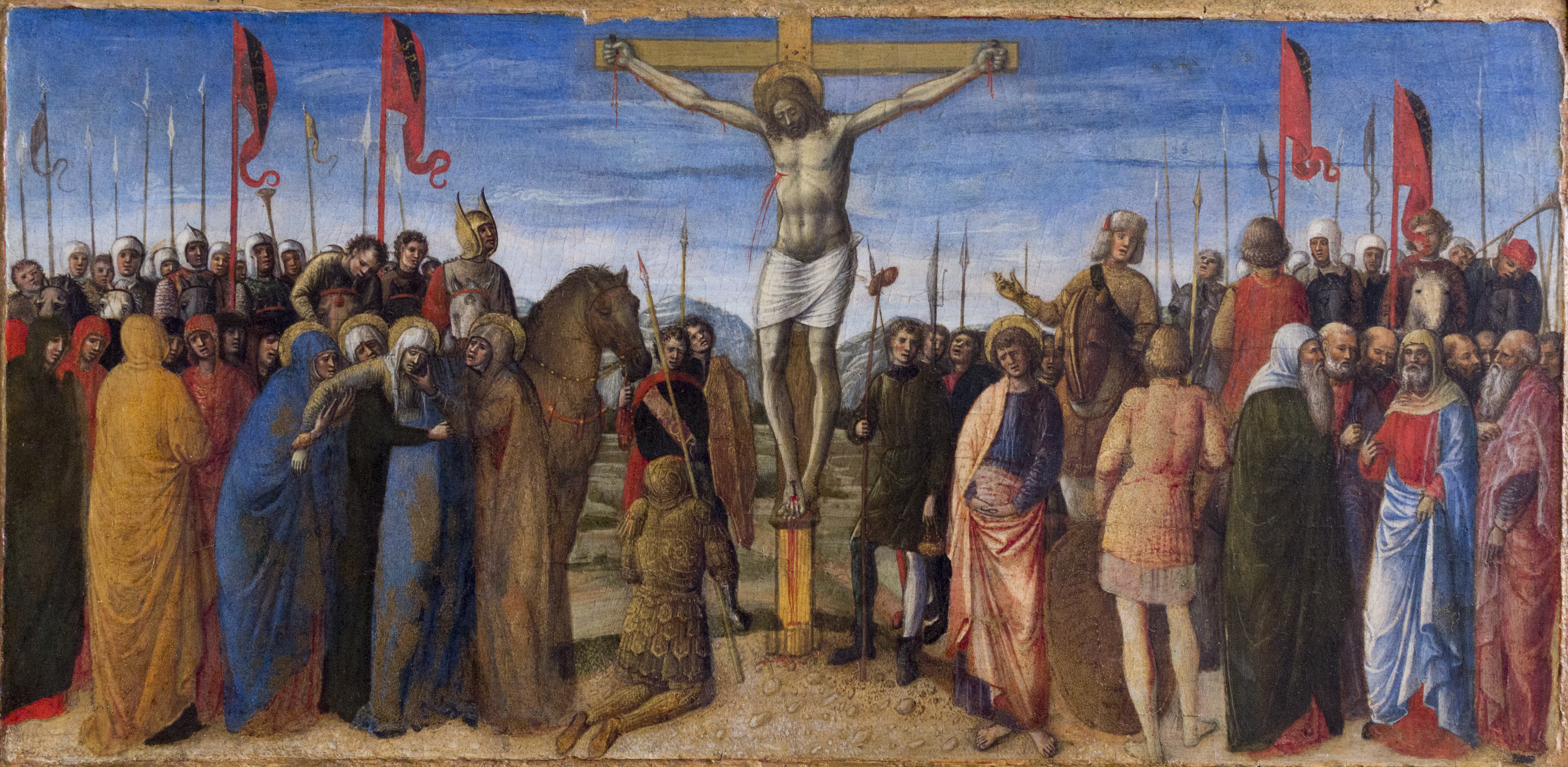 Crocefissione, par Jacopo Bellini, exposé au Musée Correr de Venise en 2017.